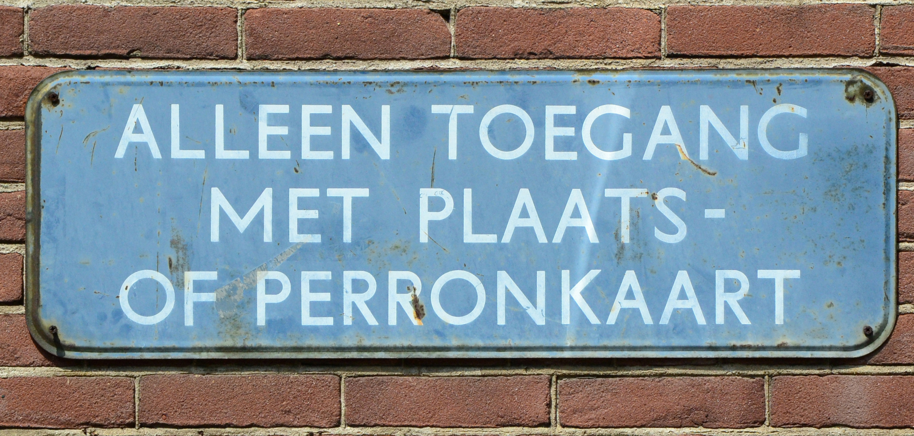 Historisches Schild am ehemaligen Bahnhof in Lisse.